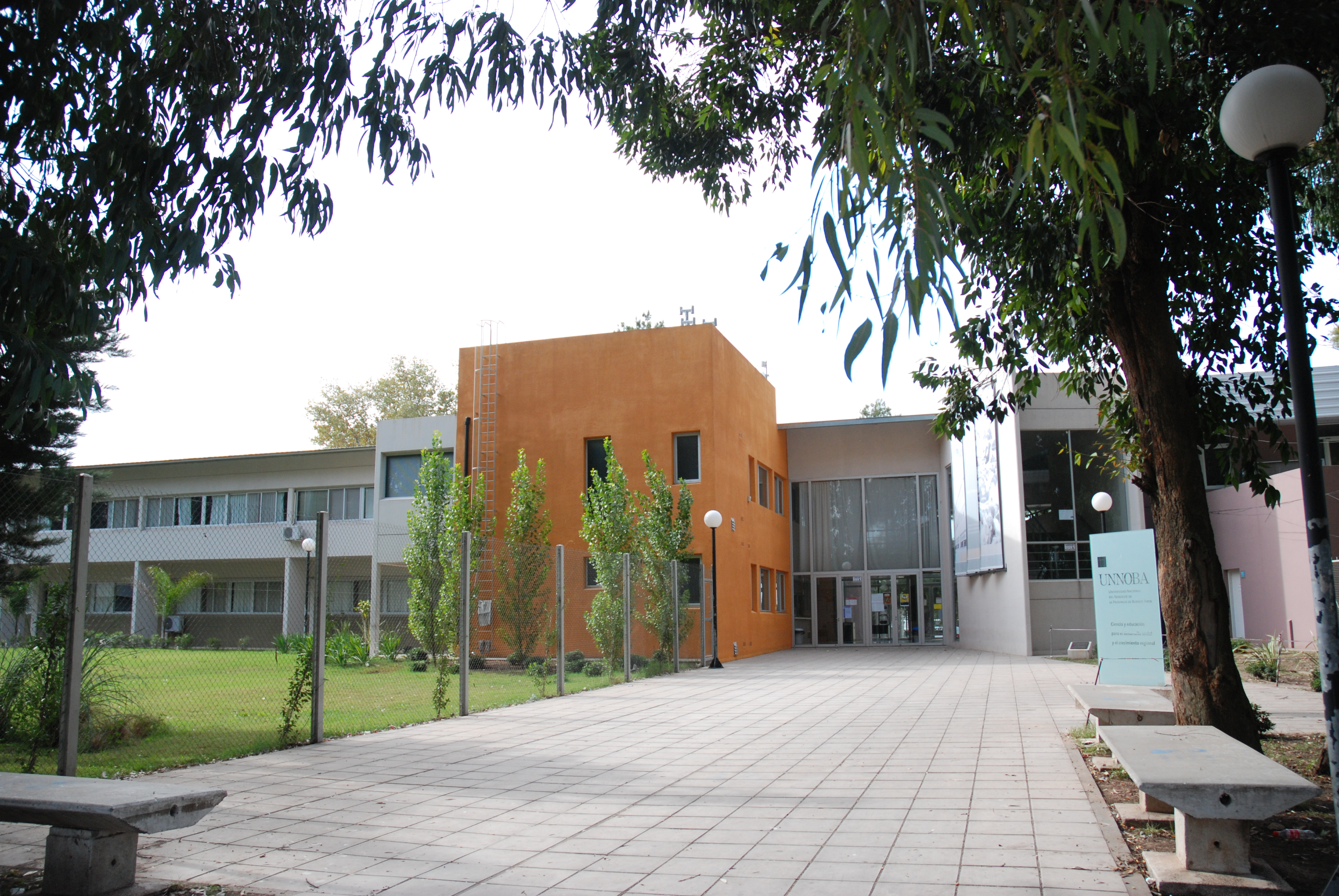 Edificio principal de la Sede Pergamino de la Universidad Nacional del Noroeste de la Provincia de Buenos Aires (UNNOBA), ubicado en Monteagudo 2772.